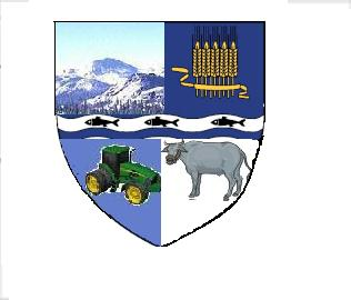 A Brassó megyei Sebes falu címere (Fogarasi-havasok, búzakalász, traktor és bivaly)